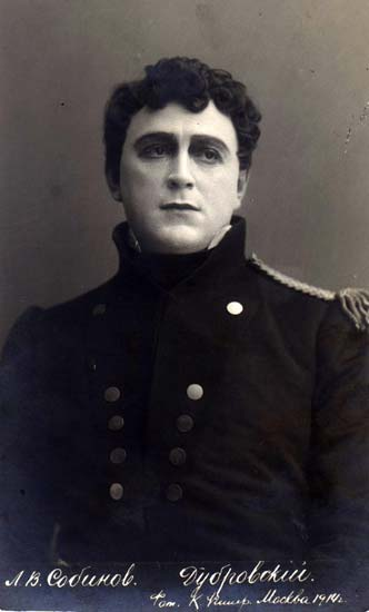 Leonid_Sobinov as Vladimir Dubrovsky.